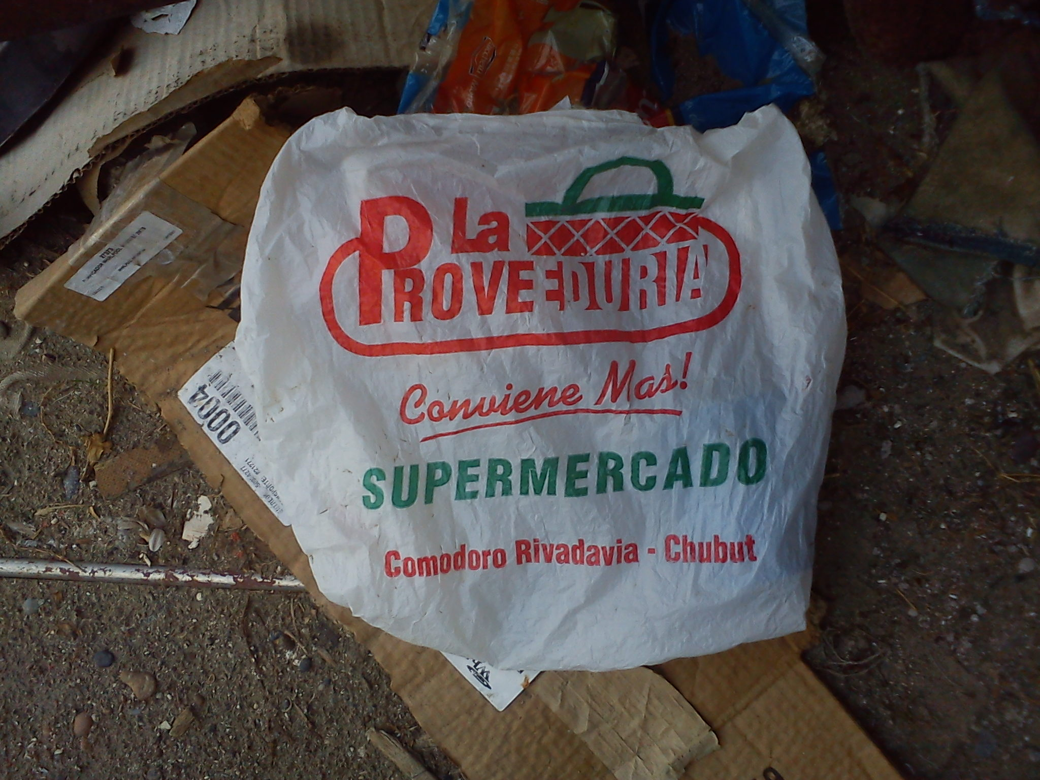 Bolsa del supermercado La Proveeduría